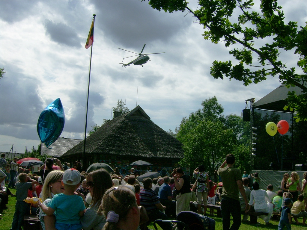 Vytogala. Girėno gimtinė